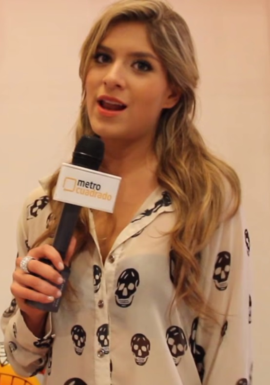 Al pasar la puerta del apartamento de la modelo bogotana Laura Tobón, nos encontramos con un colorido dúplex que refleja la buena energía que transmite la modelo y presentadora.